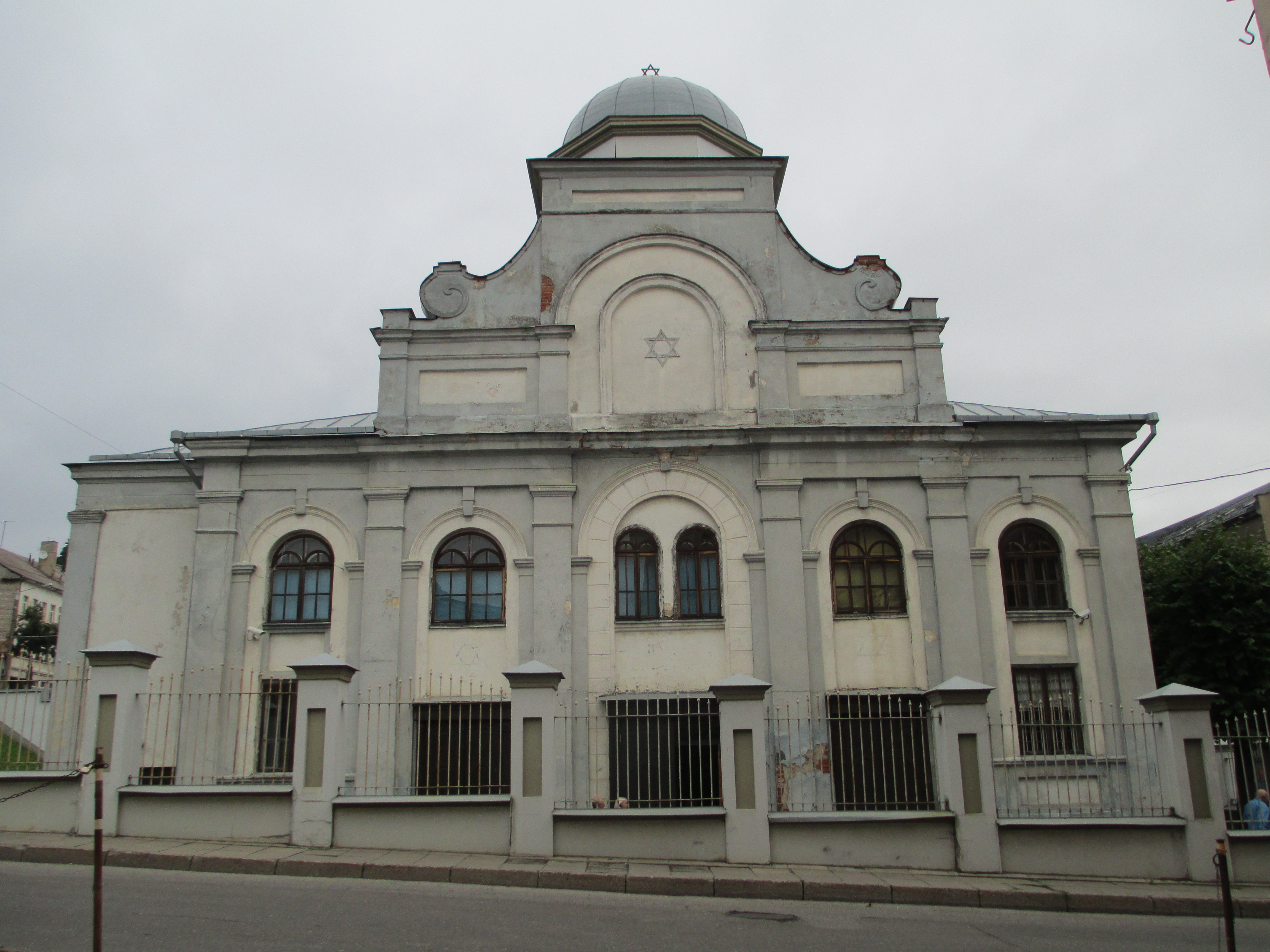 בית הכנסת כורל בקובנה